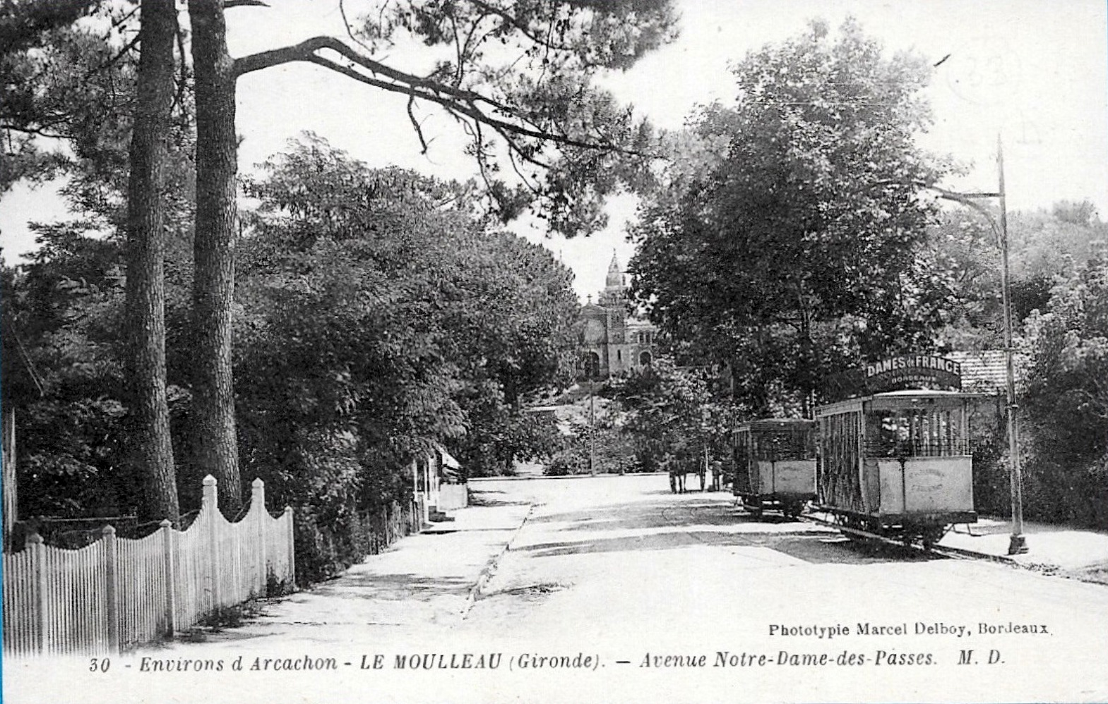 Rues d'Arcachon